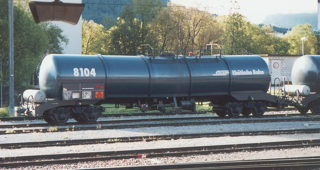 Cisterna Rhétské dráhy. O tom, že úzkorozchodná síť RhB má stále své nezastupitelné místo v dopravě svědčí i pořizování moderních vozidel.